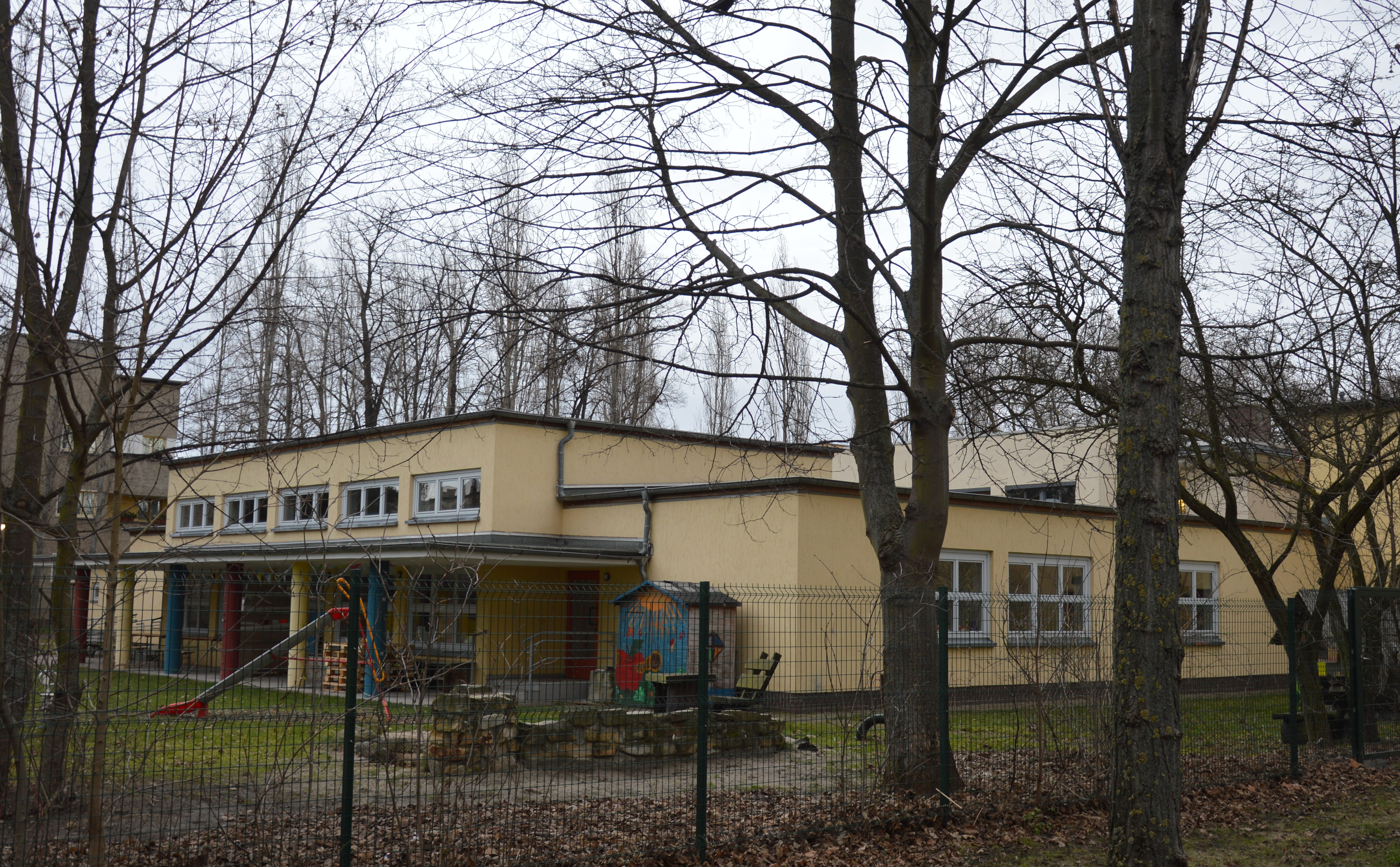 Kindergarten Flechtinger Straße